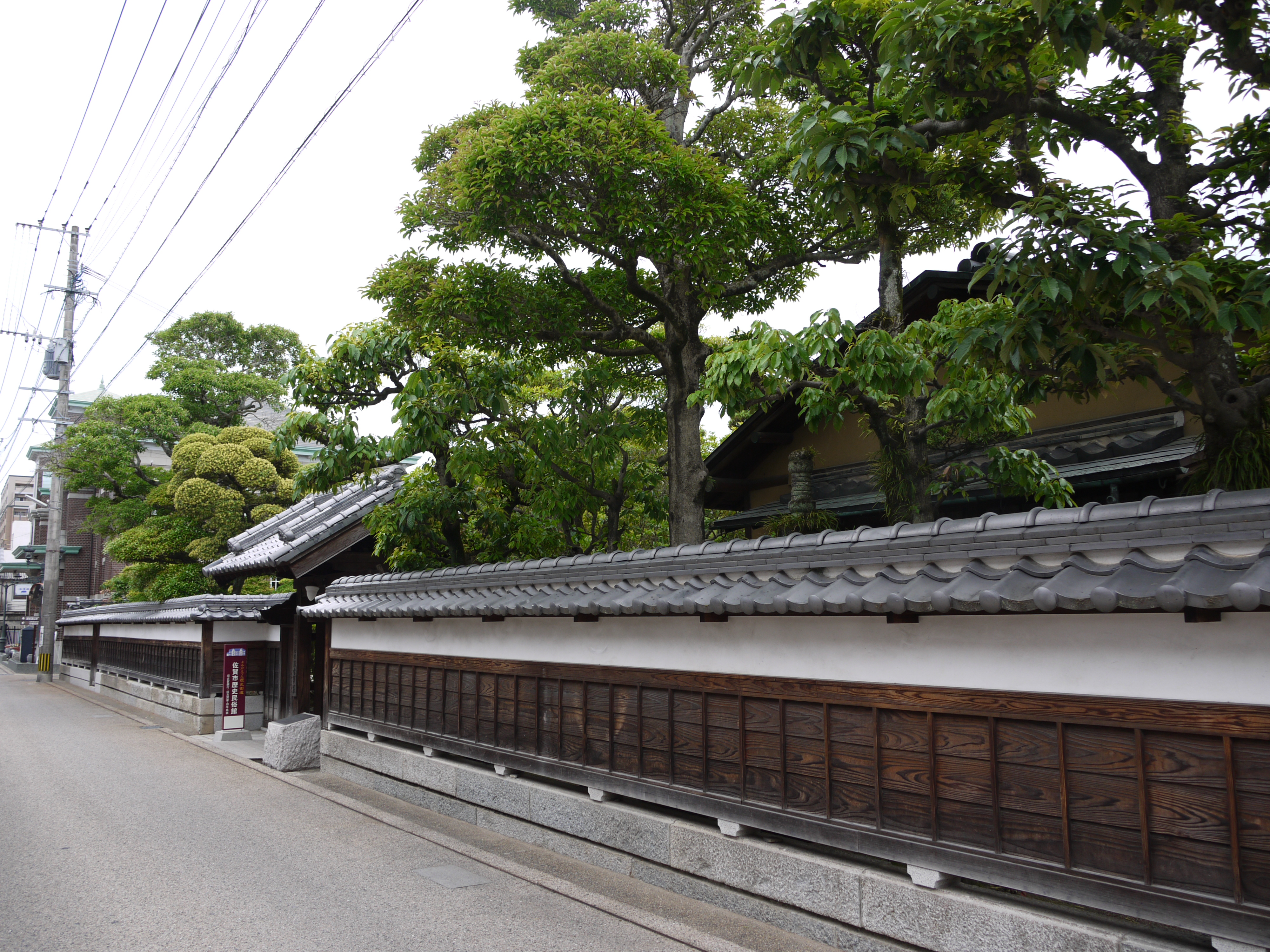 佐賀市歴史民俗館 旧古賀家